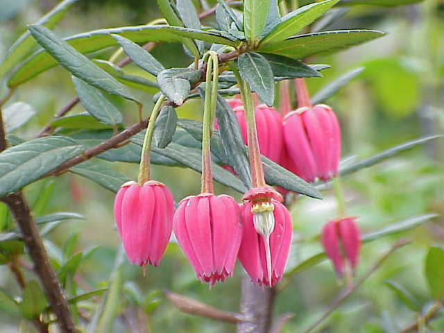 Crinodendron hookerianum1